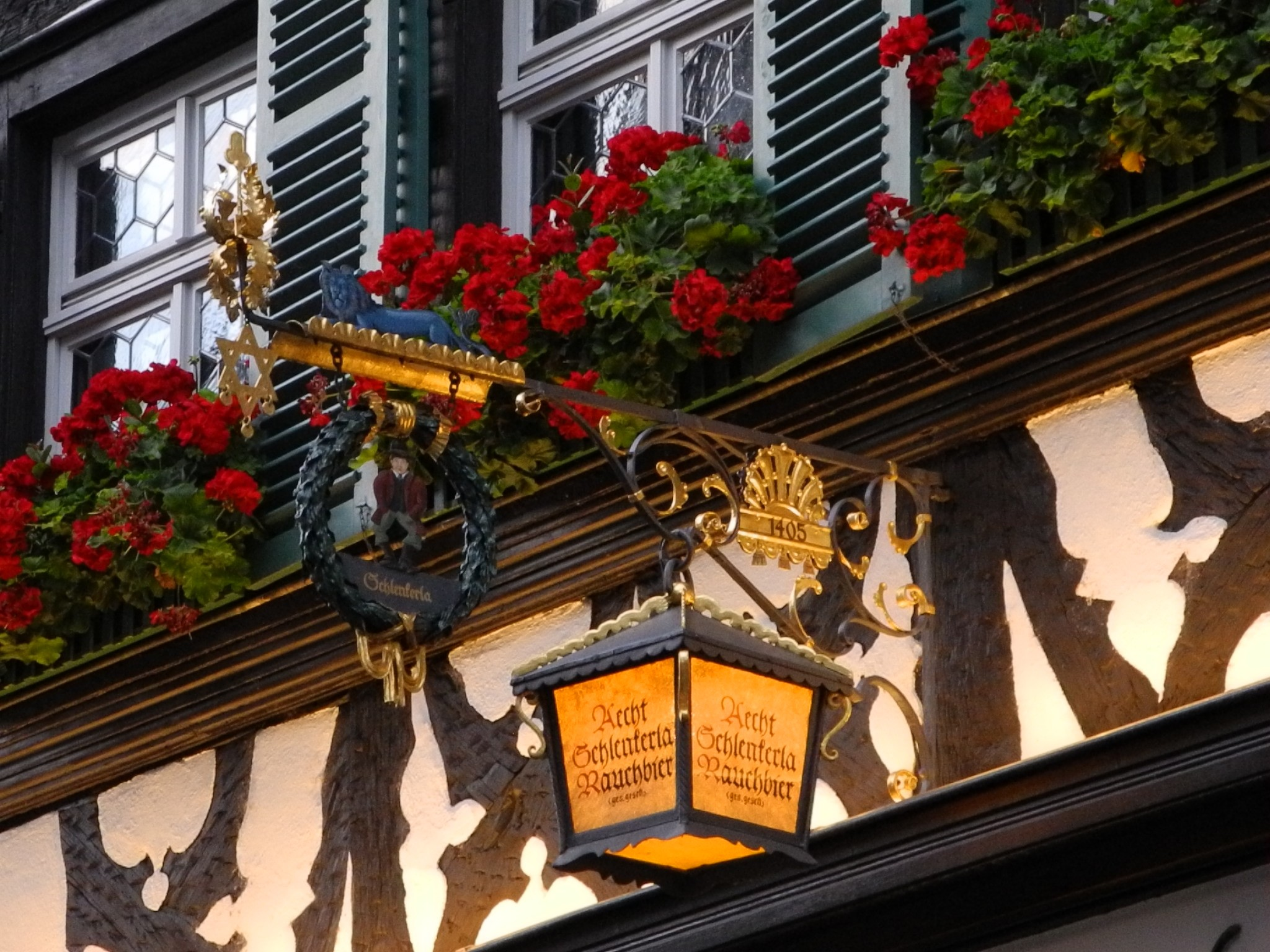 Bamberg - Altstadtlokal, Schild Schlenkerla